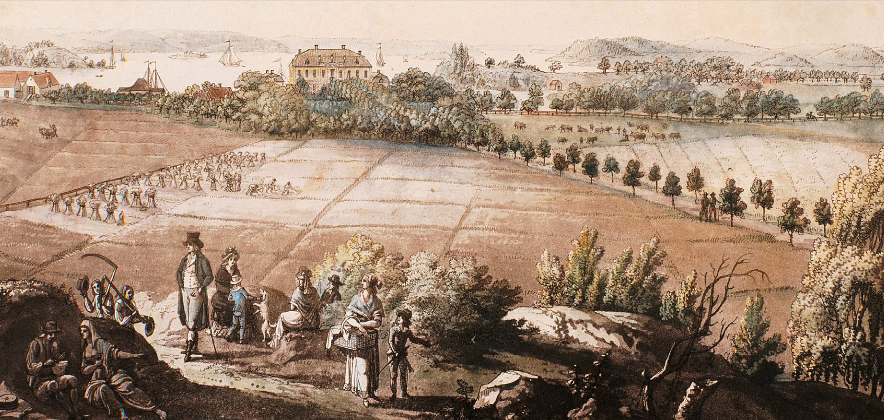 Sturehov: Utsnitt ur akvarellerad konturetsning av Martin Rudolf Heland, vy från väster